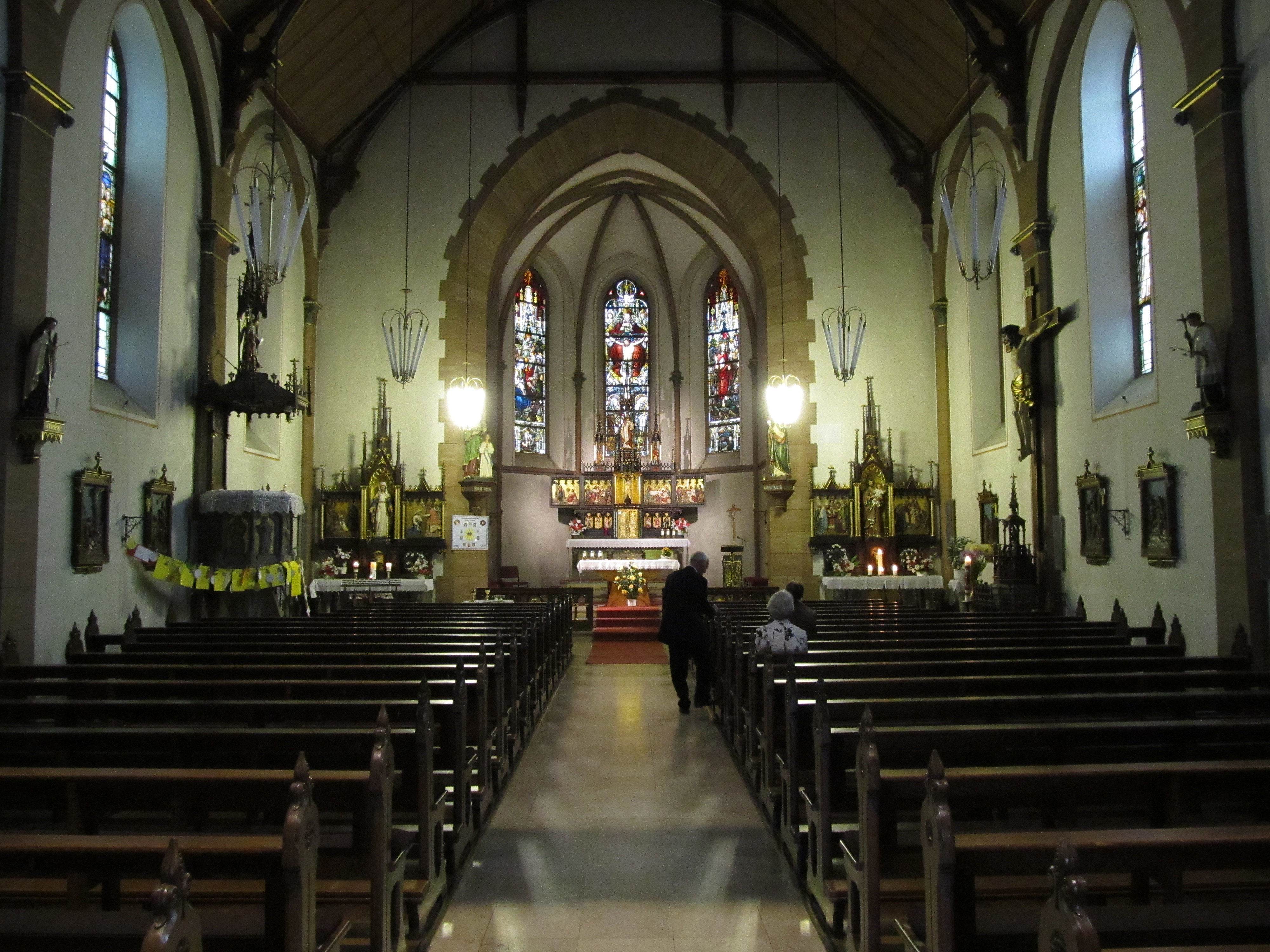 Das Innere der Pfarrkirche St. Anna in Biesingen, Saarland